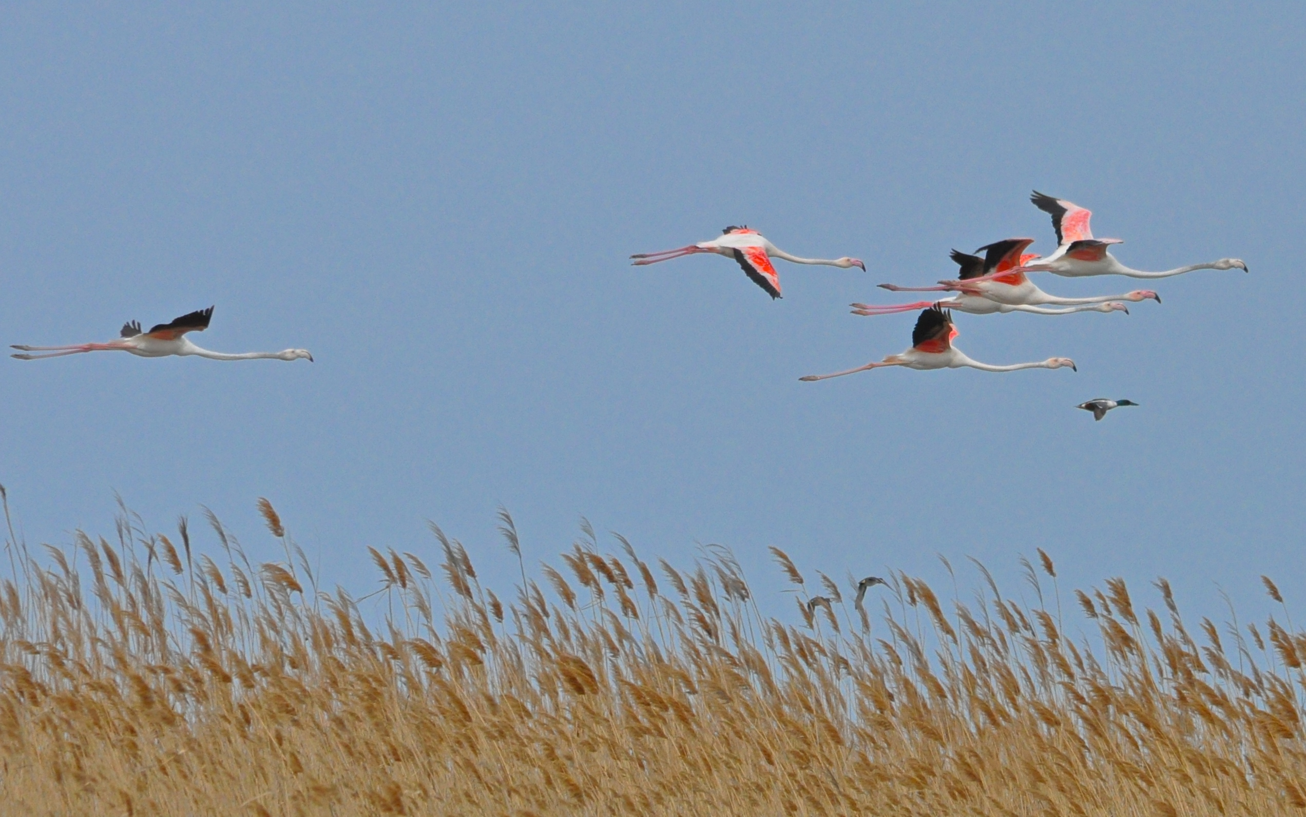 Flamingos at Hirkan National Park 1